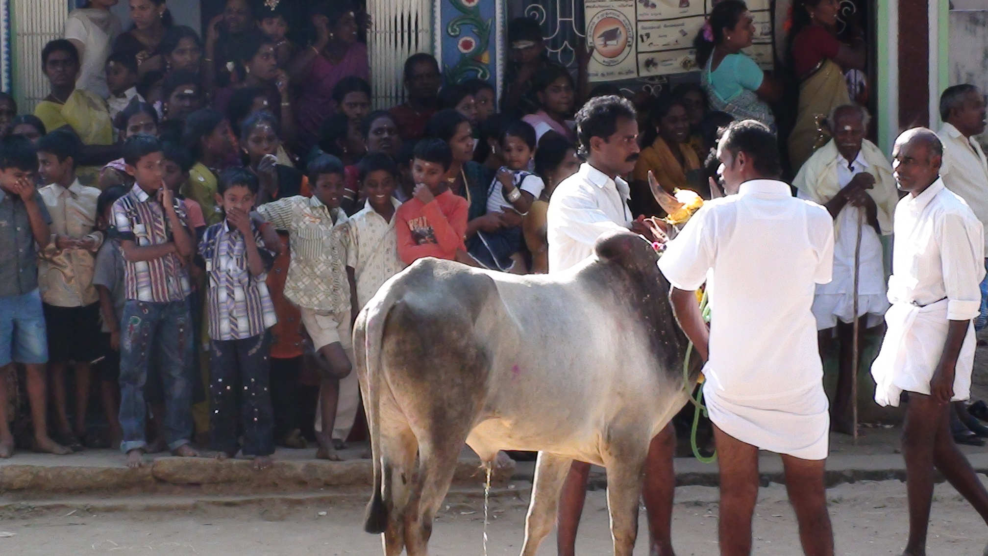 மாட்டுப் பொங்கலன்று ஏறுதழுவு விழாவில் ஒரு காட்சி